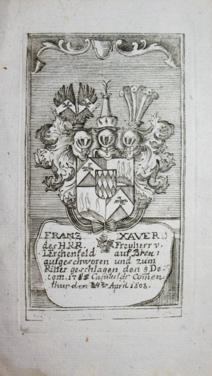 Wappen Franz-Xaver Freiherr v. Lerchenfeld Brennberg Kupferstich Gebr. Klauber 1809